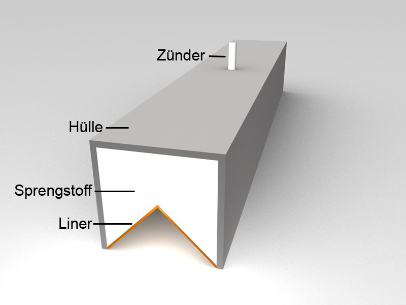 Schneidladung mit einem Computer nachmodelliert